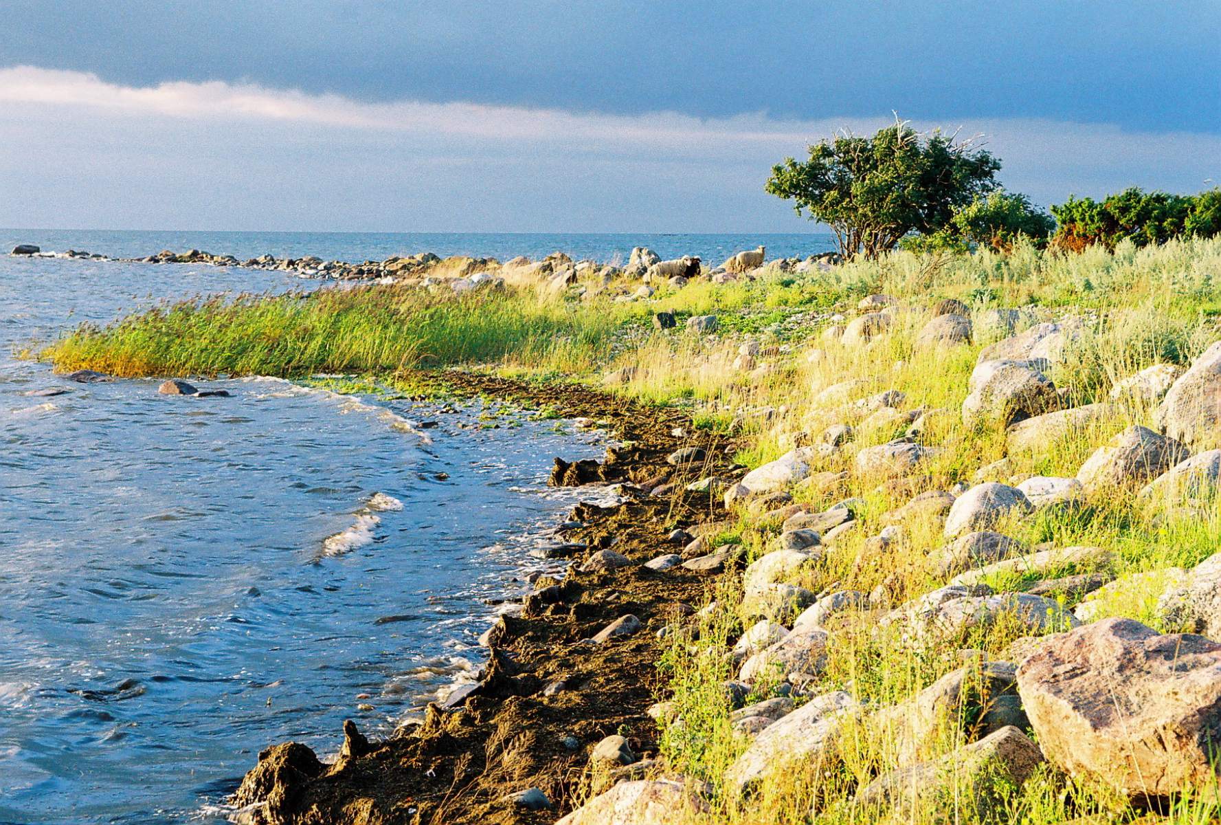 Kumari laid Väinameres